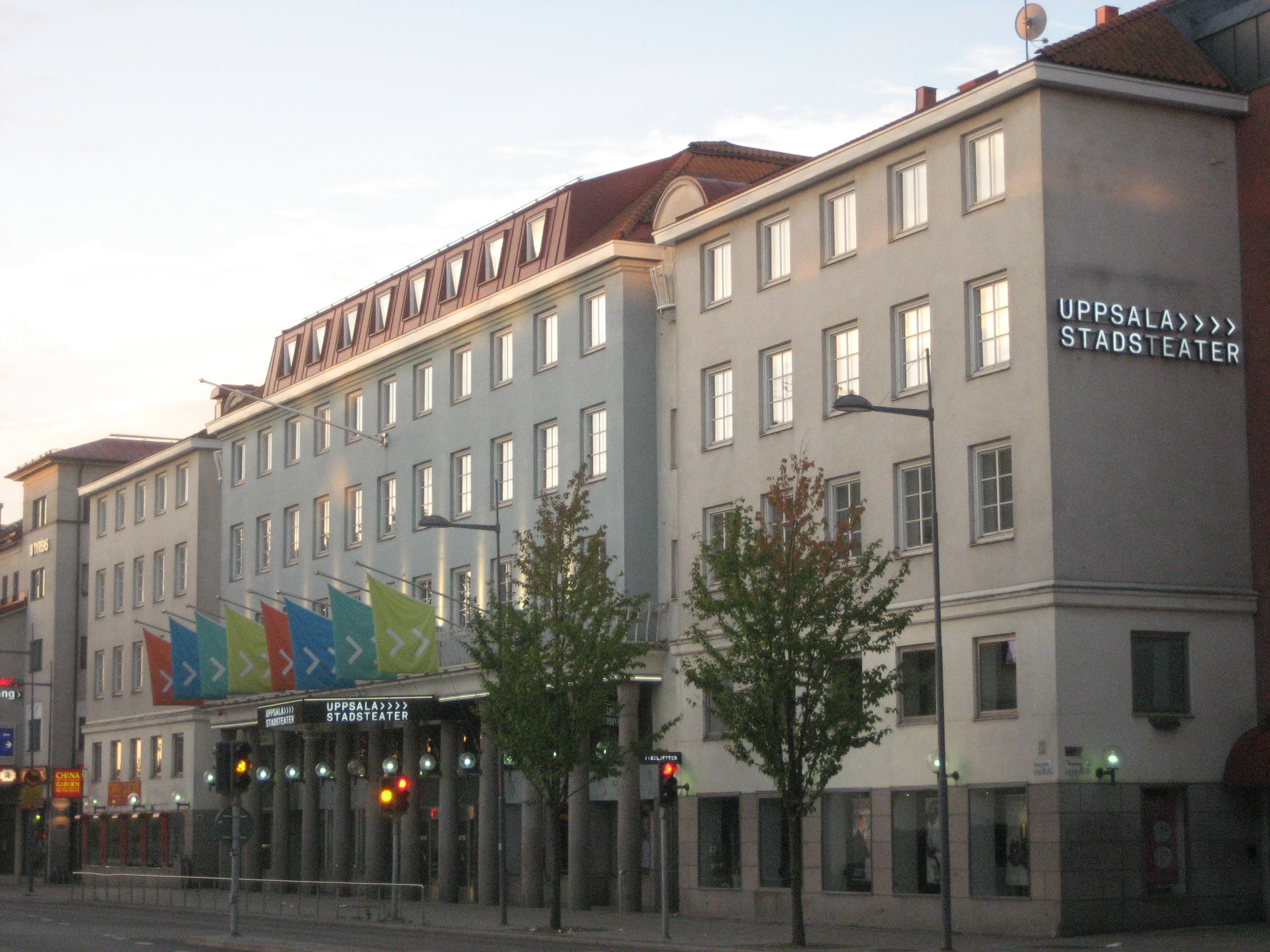 Uppsala Stadsteater (Sverige)